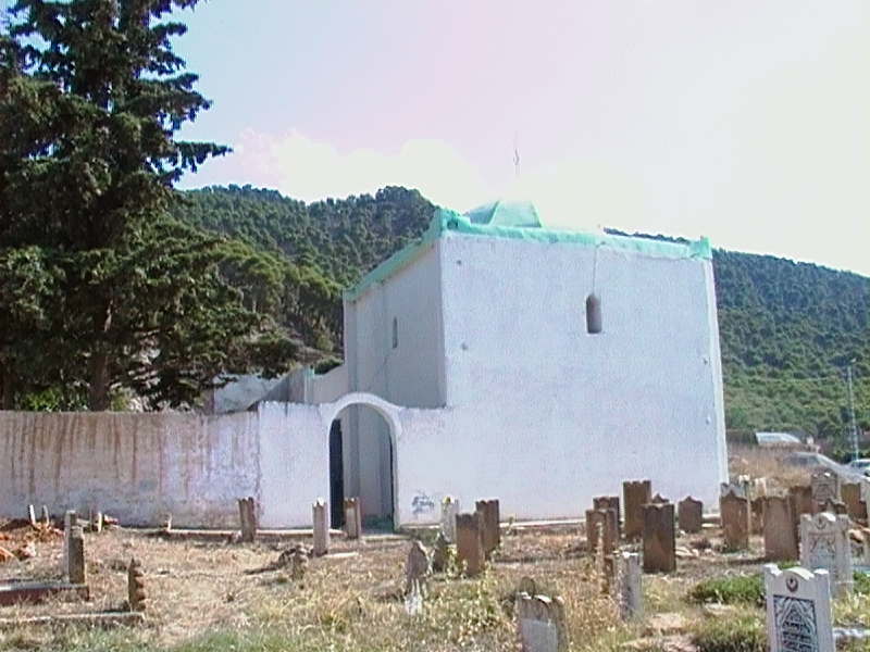 Made by Samsung DVC